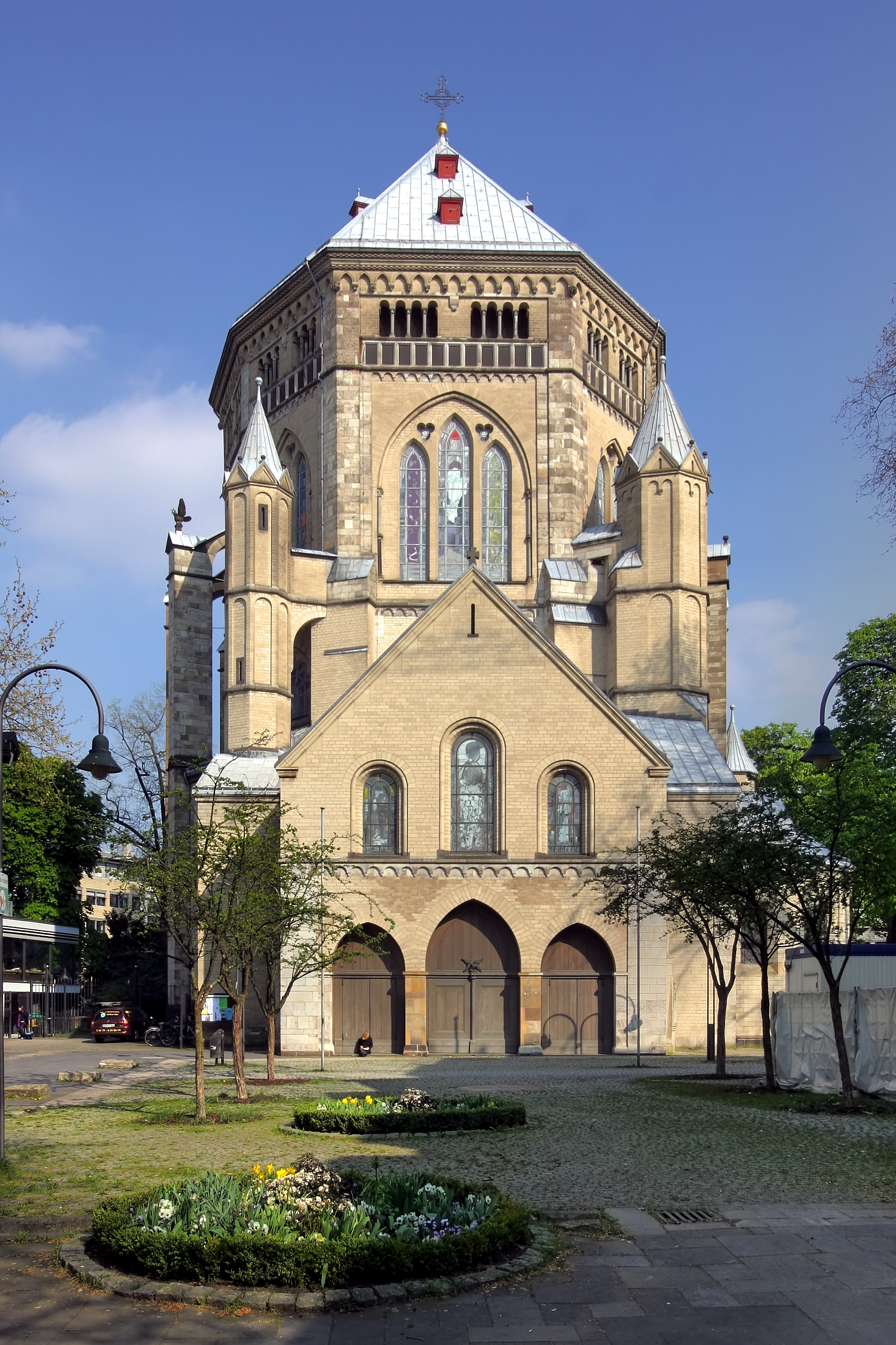 St. Gereon, Köln. Westansicht: Vorhalle und Dekagon This is a photograph of an architectural monument.